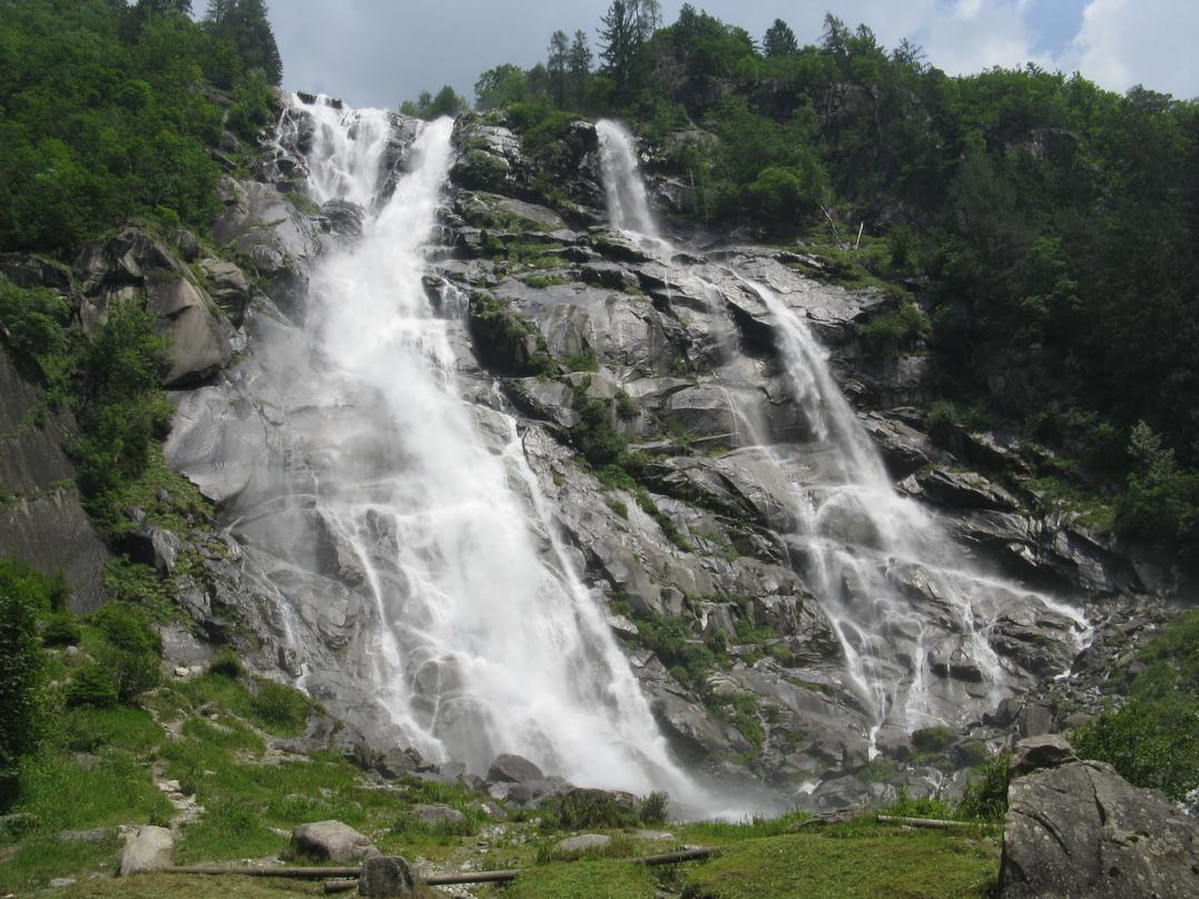 Cascate Nardis, Val Genova, Trentino-Alto Adige, Italia